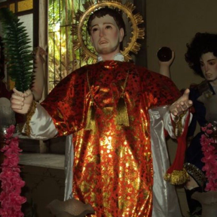 Patron Saint